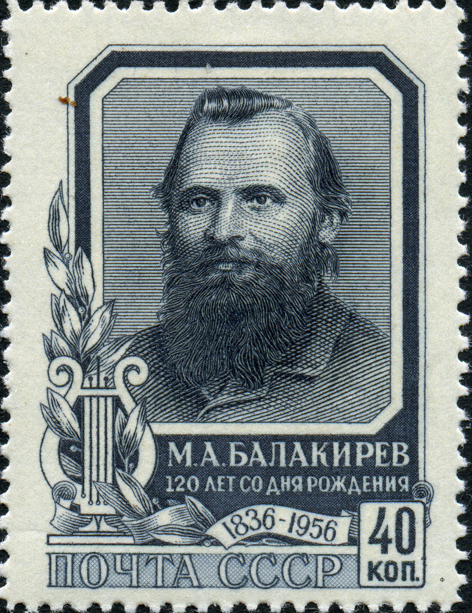 Марка СССР